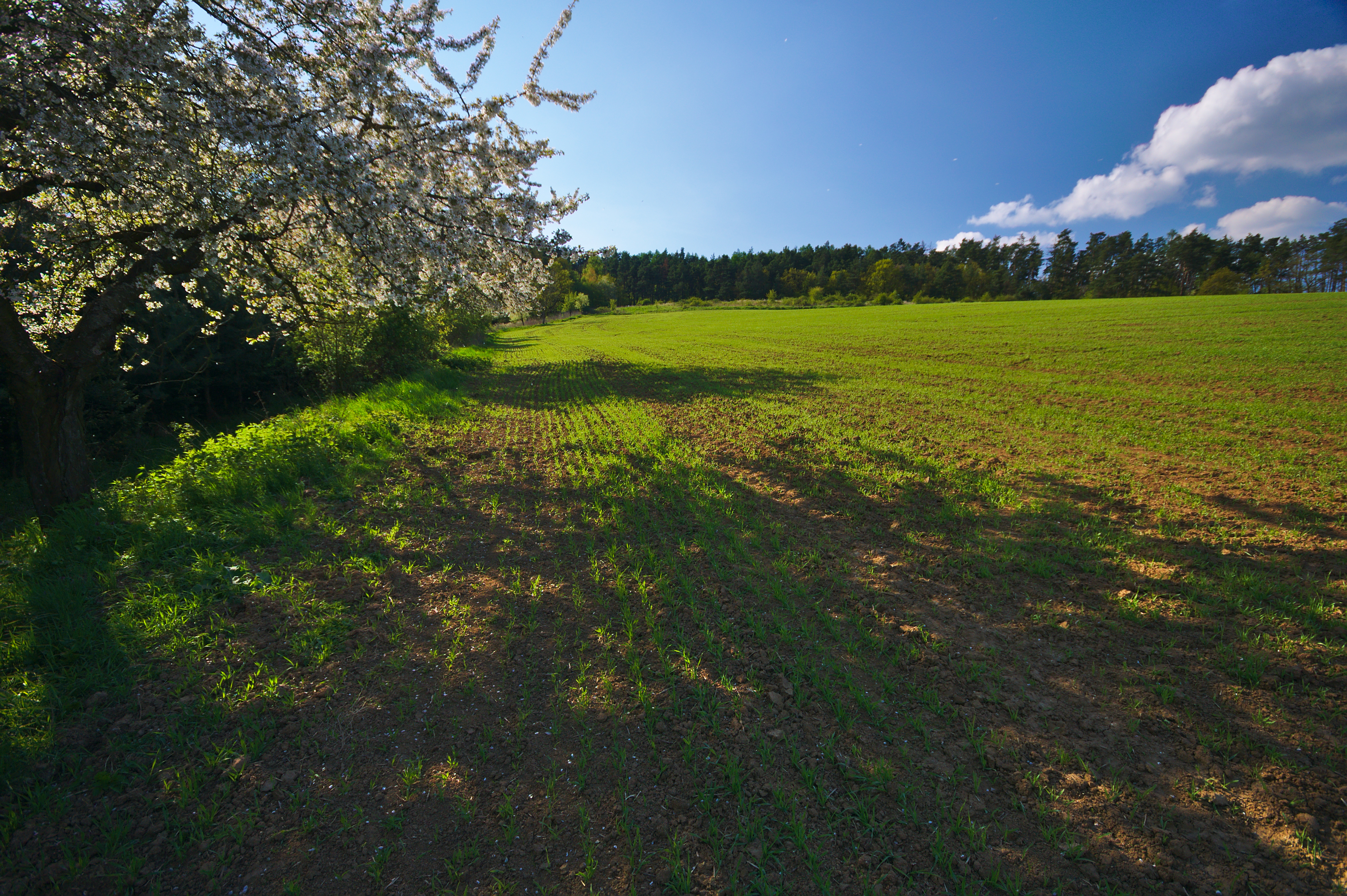 Přírodní památka Pod Obrovou nohou, okres Prostějov